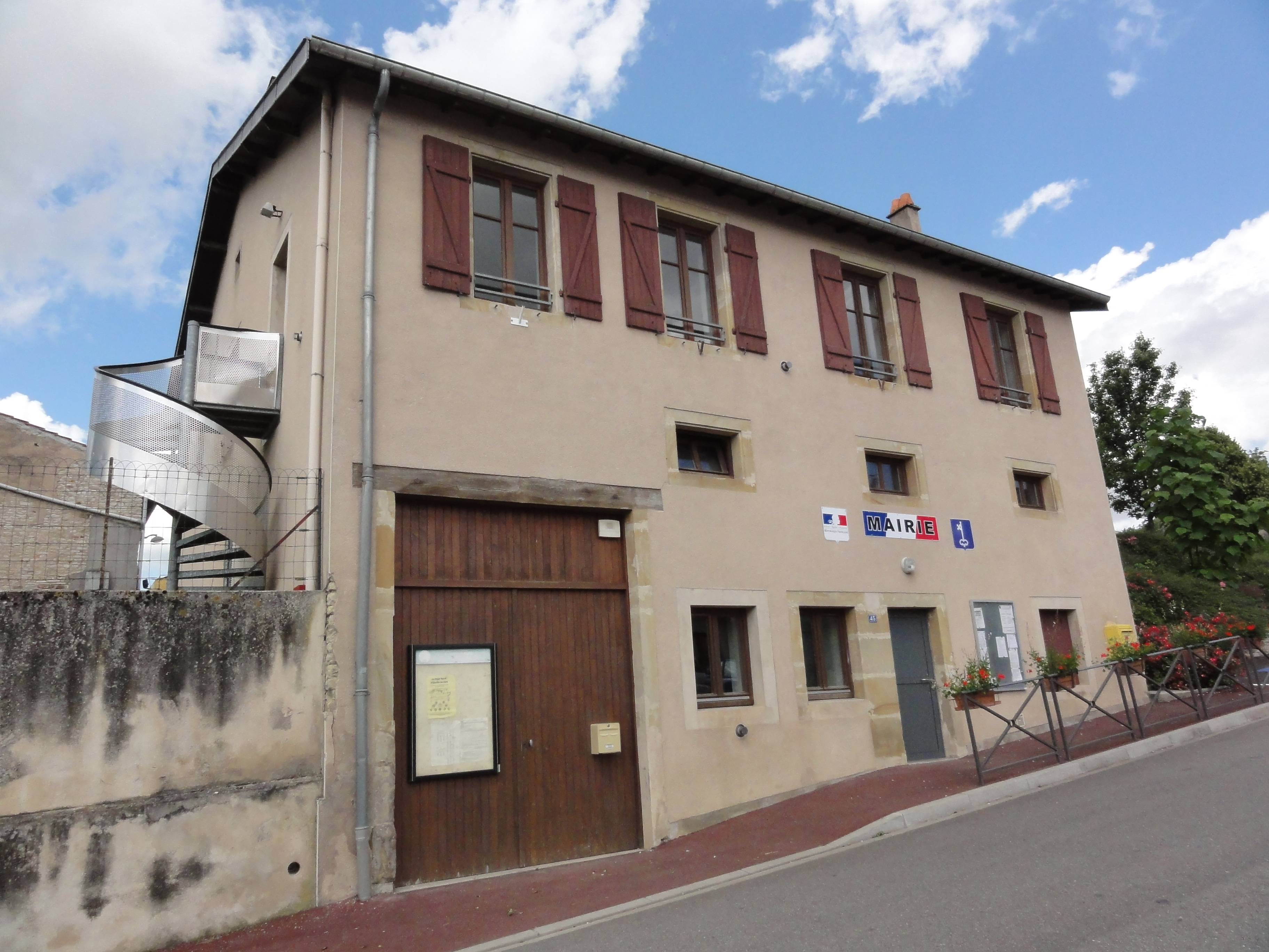 Bauzemont (M-et-M) mairie